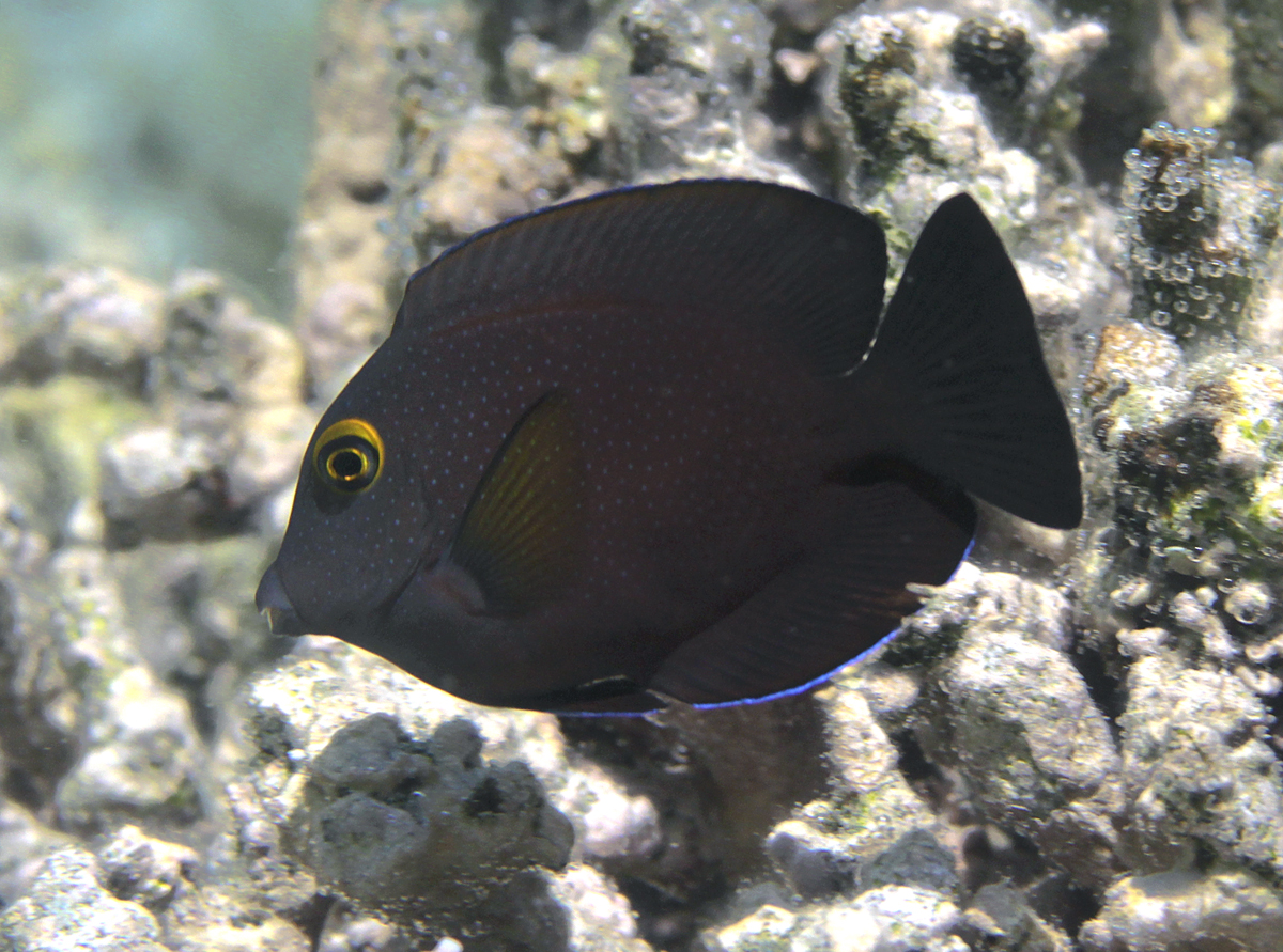 Un chirurgien Ctenochaetus truncatus à la Réunion.